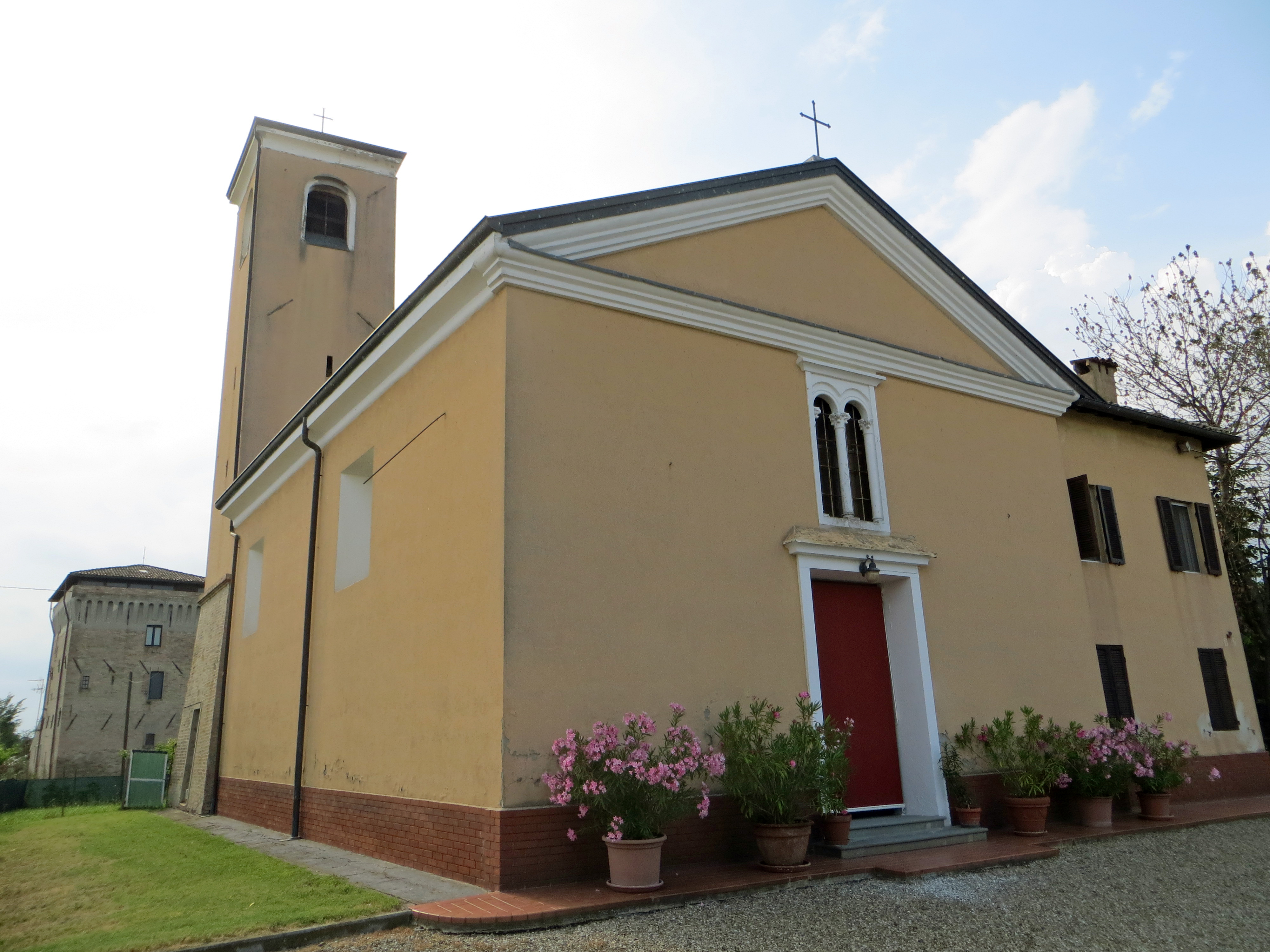 Chiesa della Purificazione di Maria Vergine (Beneceto, Parma) - facciata e lato sud